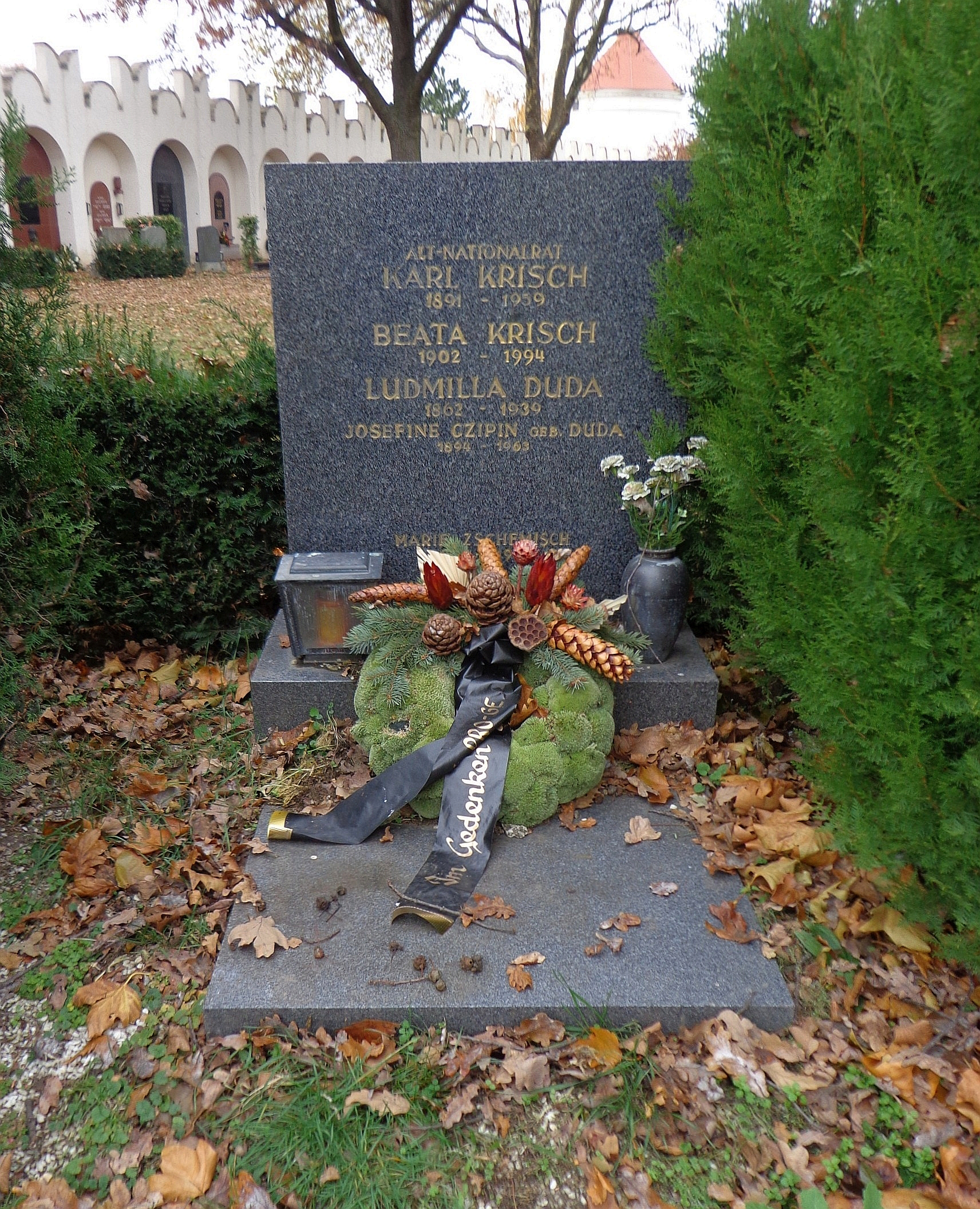 Feuerhalle Simmering - Abteilung 8 (Urnenhain, Erdgräber): Urnengrab von Karl Krisch (Abteilung 8, Ring 3, Gruppe 7, Nummer 11)